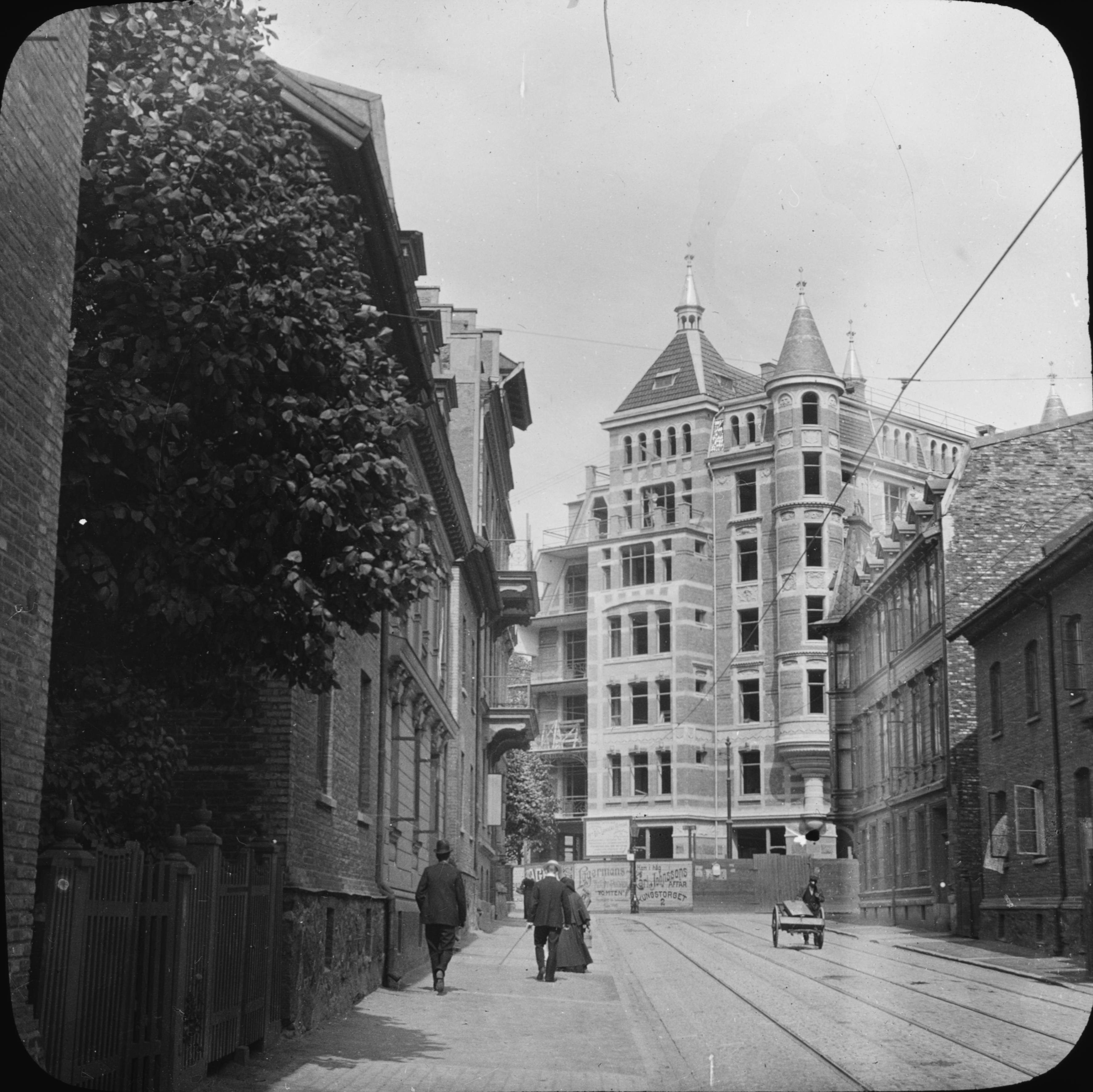 Louis Enders Jugendhus från 1901-1902 på Föreningsgatan i Göteborg under byggnadsfasen. Fotot taget från Västergatan ned mot Annedal. Arbetarebostäderna från andra hälften av 1800-talet på vardera sida är rivna sedermera, men spårvagnsspåren ligger kvar (2012). Stenhusen ligger dock kvar i ett stråk längs Carl Grimbergsgatan något kvarter mot sydöst, längs Nilssons berg.